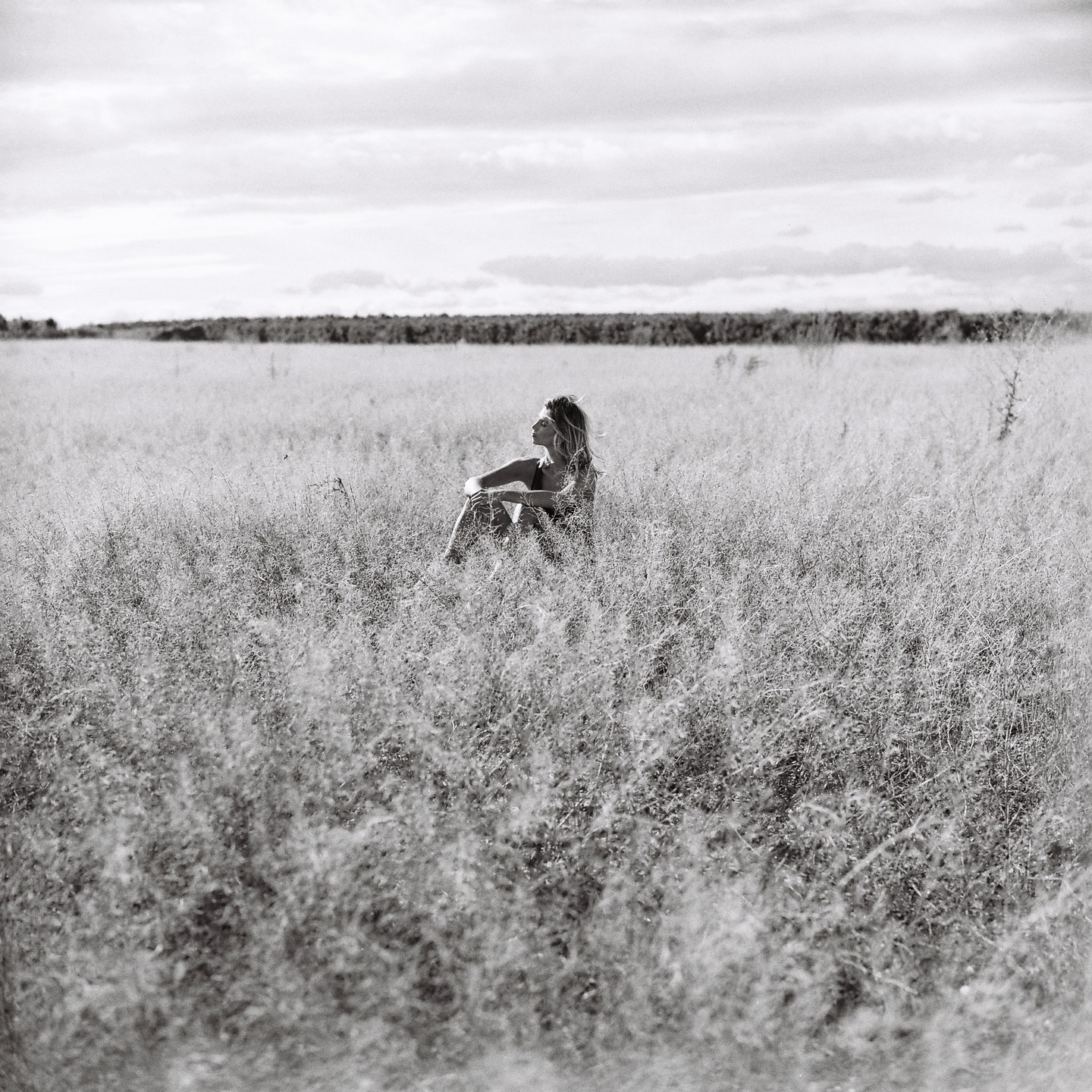 Alexandra By Etienne dans la savane